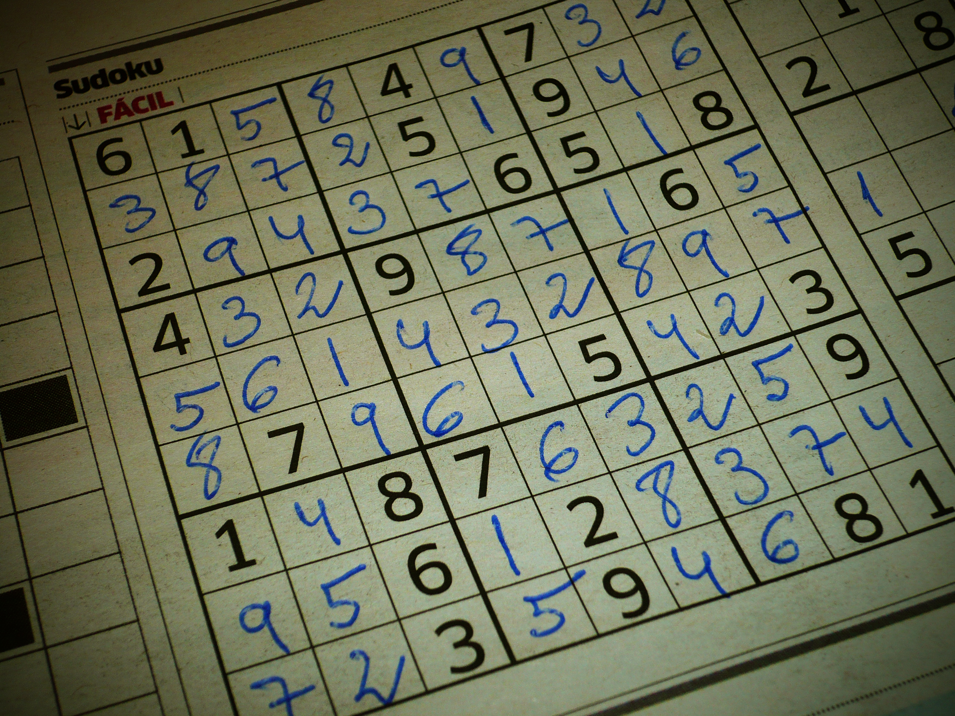 Sudoku resuelto, impreso en un periódico español.